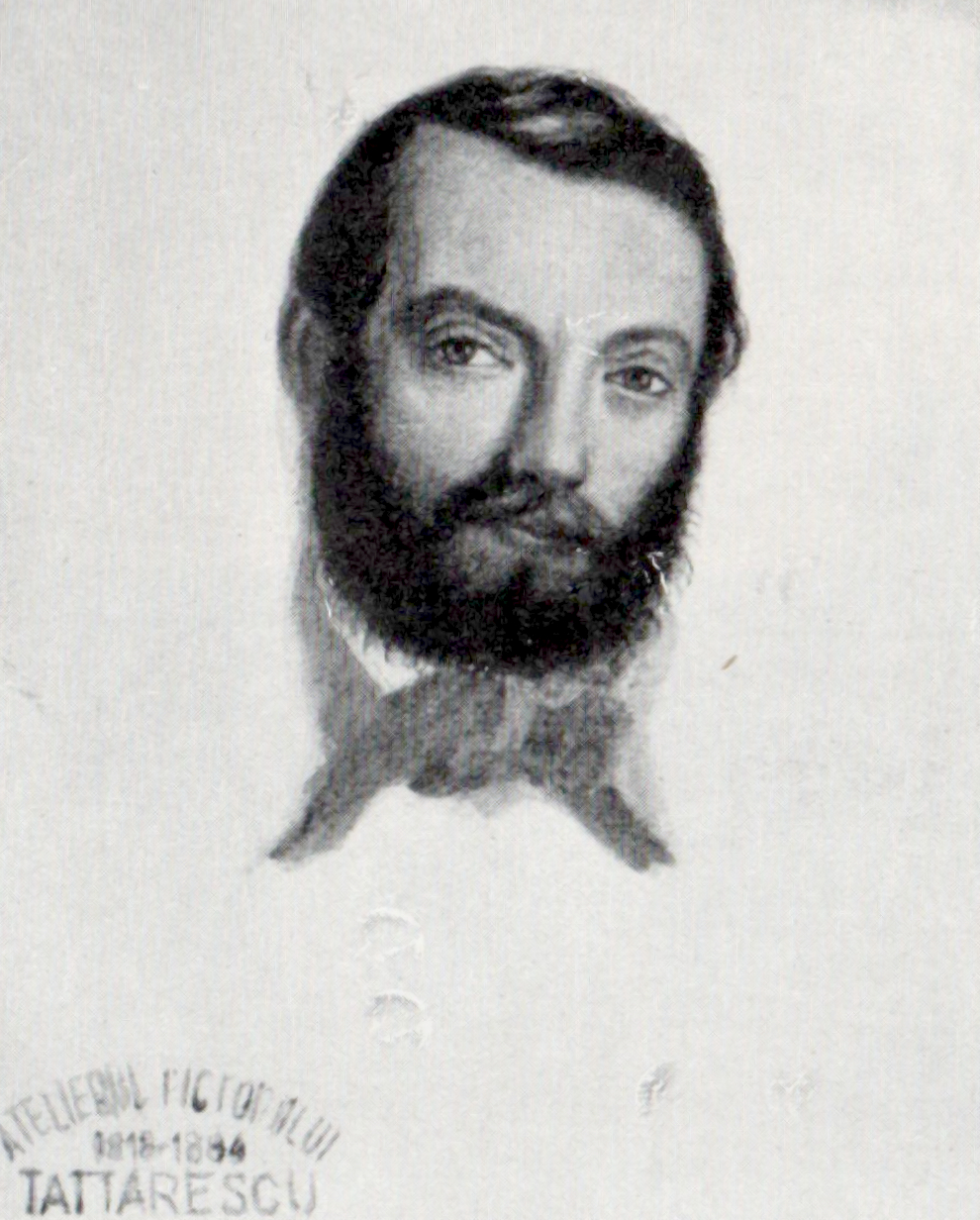 Portret de bărbat - Alexandru Orăscu, acuarelă, 0,10x0,08m - Muzeul Gheorghe Tattarescu